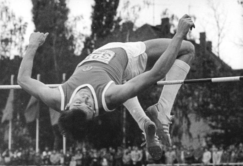 Gerd Wessig ADN-ZB Häßler 18.7.80 Cottbus: 31. DDR-Meisterschaften in der Leichtathletik. Gerd Wessig (SC Traktor Schwerin) bewältigte mit 2,30 m eine auch international gutklassige Höhe und sicherte sich damit den Titel im Hochsprung der Männer. Der Flopper sprang persönliche Bestleistung und blieb nur 1 cm unter dem DDR-Rekord. An der neuen Rekordhöhe von 2,32 m scheiterte er knapp.